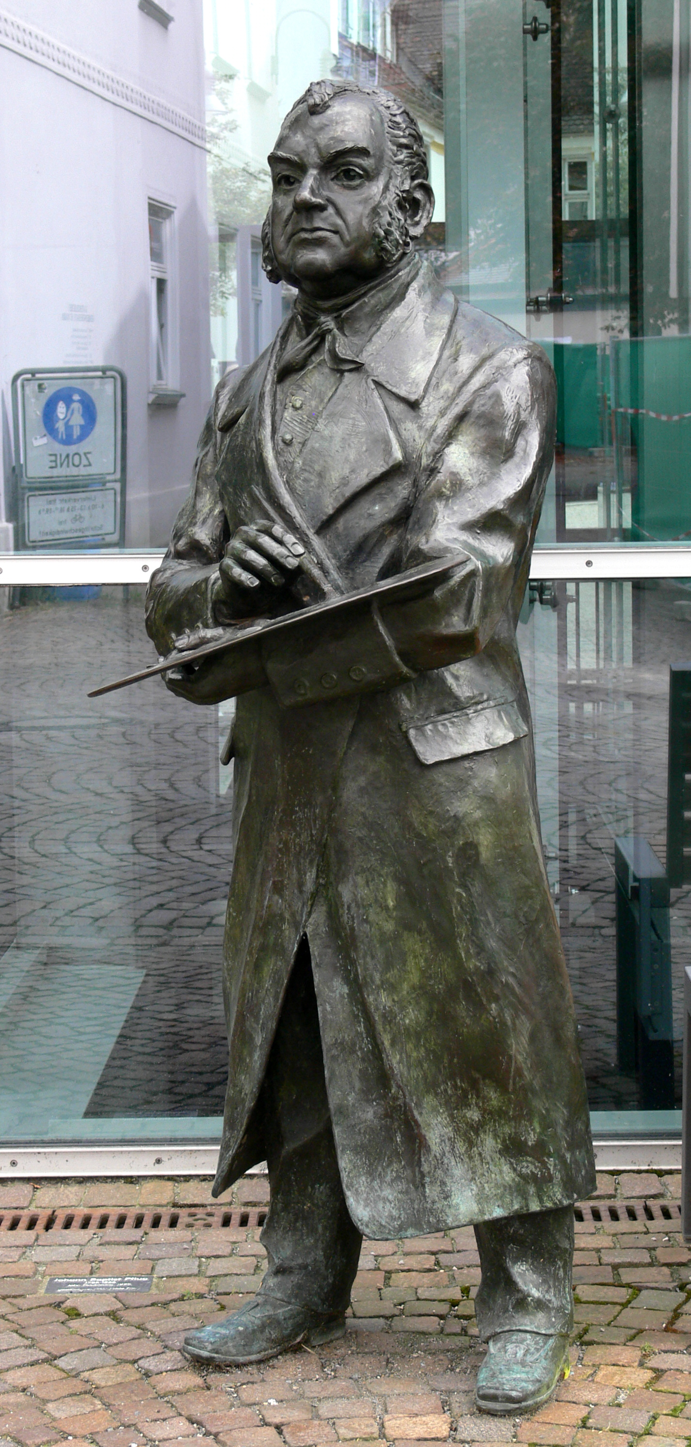 Biberach an der Riß Statue "Johann Baptist Pflug" von John Doubleday, 1995 (gestiftet von OSD Hilde Frey), vor dem Braith-Mali-Museum